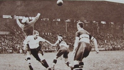 Image de la finale de la Coupe de France1932-1933 opposant deux clubs de Roubaix : l'Excelsior Athlétic Club de Roubaix et le Racing Club de Roubaix (au stade Yves du Manoir de Colombes).